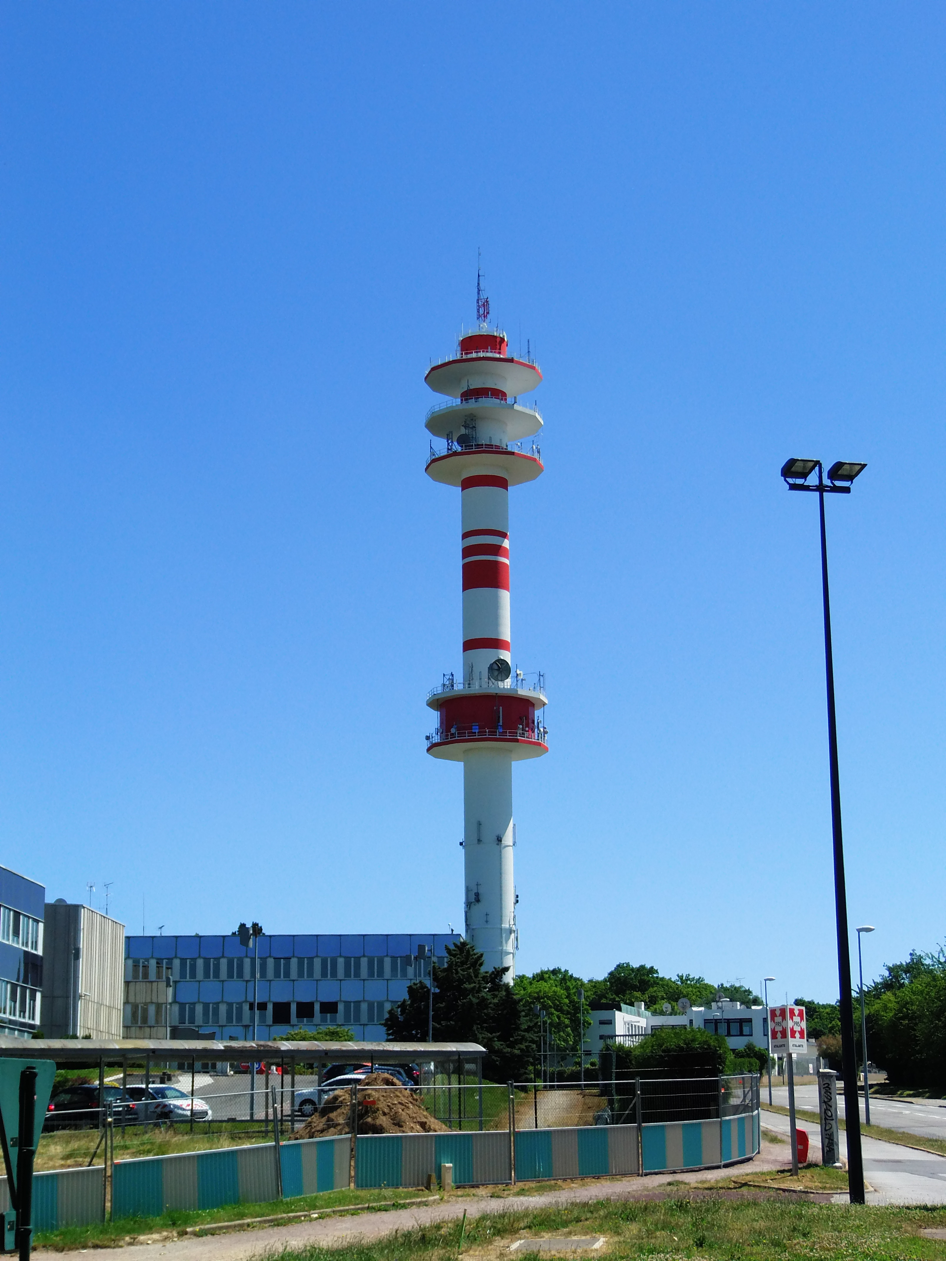 Vue de la Tour TDF de Cesson-Sévigné depuis l'Avenue de Belle Fontaine.